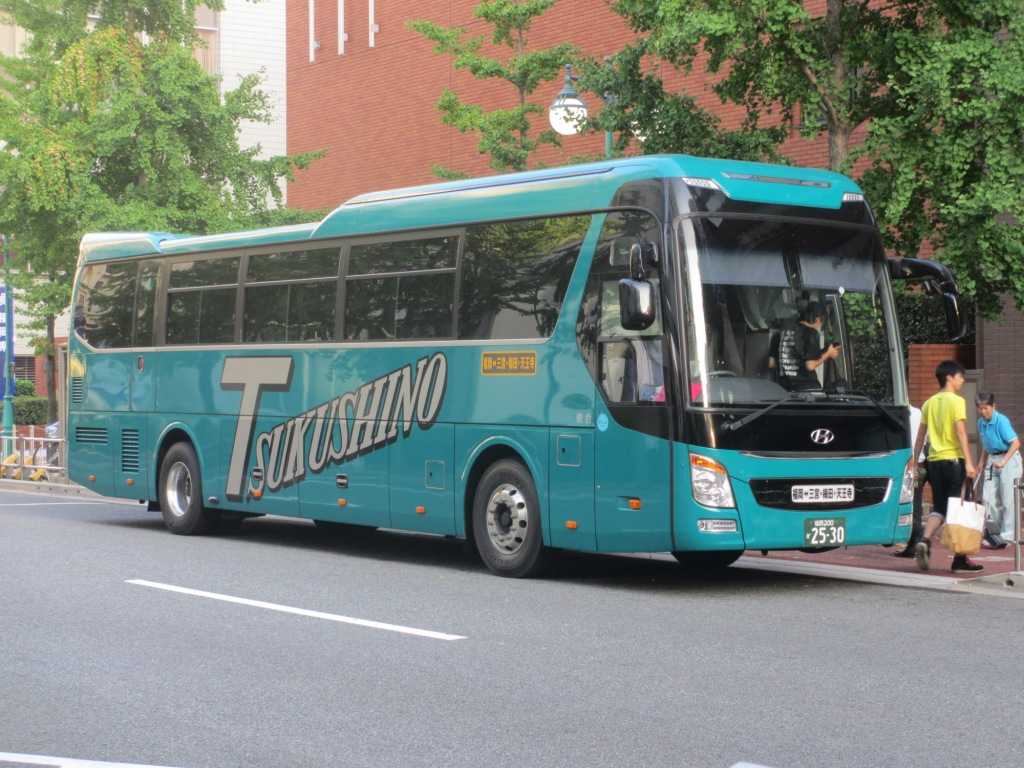 つくしの観光バスがブルーライナーに使用している乗合登録のヒュンダイ・ユニバース